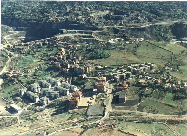 Gallarta herri berria eraikitzen, Bizkaiko meatzaldean.